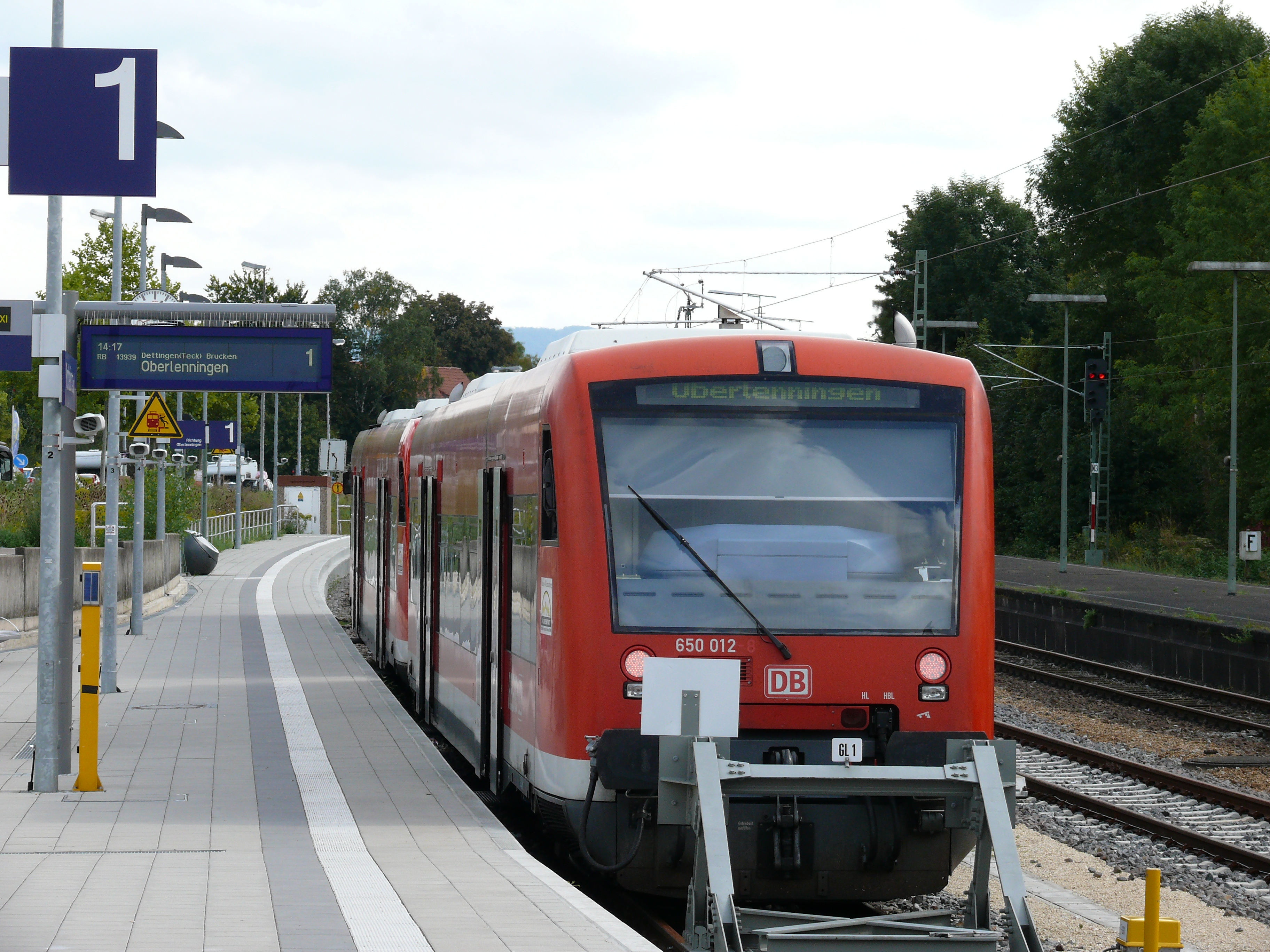 Abfahrbereite RS1-Doppeltraktion am Bahnhof Kirchhem (Teck). Ziel der Fahrt auf der Teckbahn ist Oberlenningen.